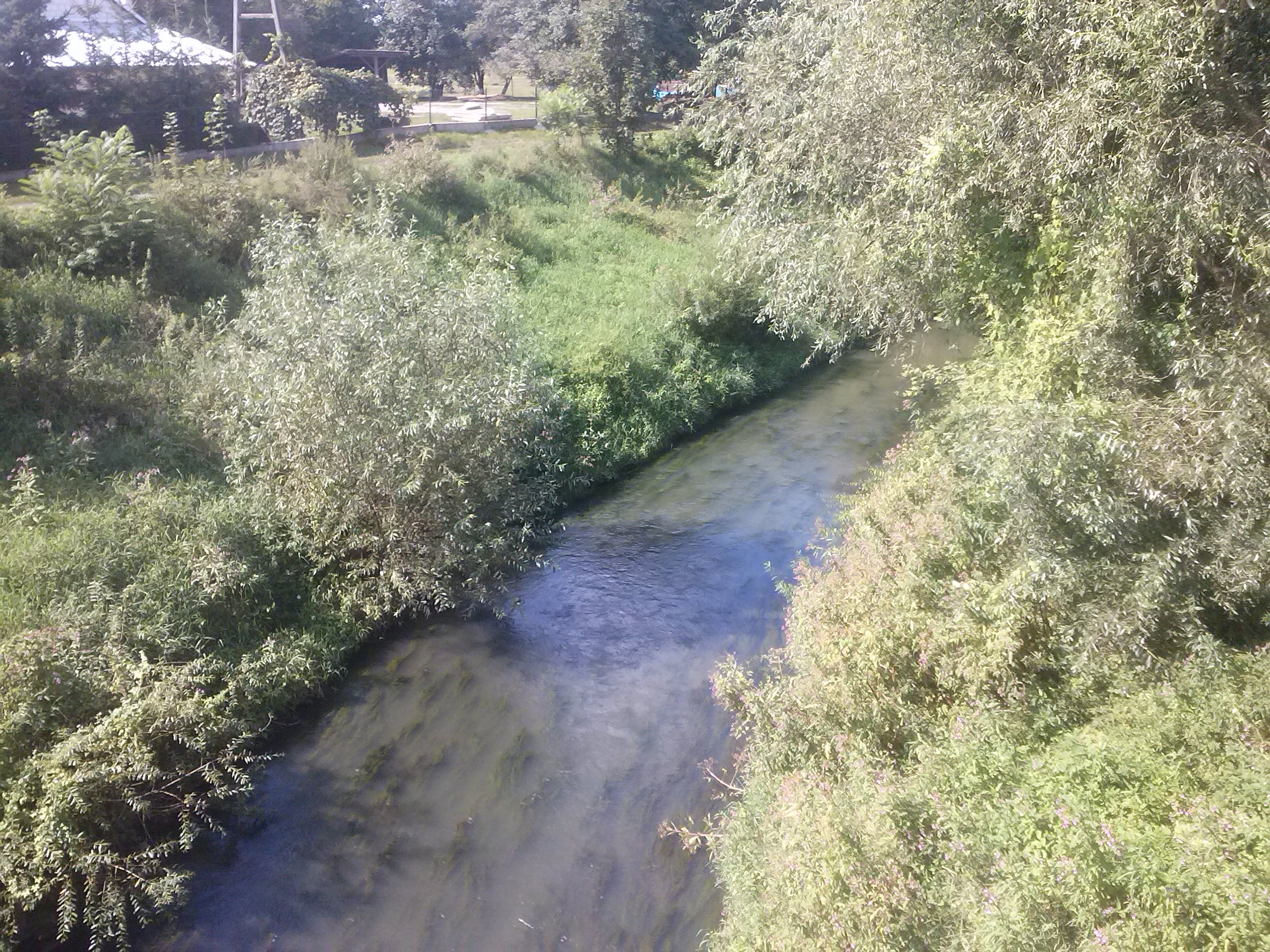 Widok na rzekę Mleczkę z mostu w Gniewczynie Łańcuckiej